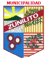 Escudo de la municipalidad de Zunilito Suchitepéquez